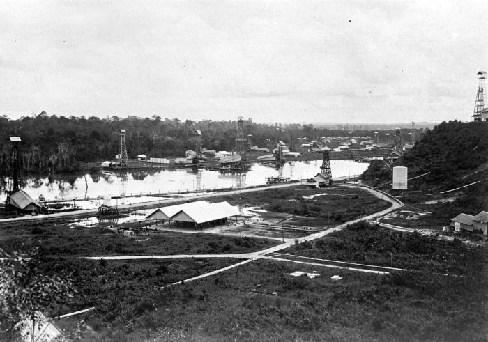 Repronegatief. Sanga-sanga rivier met B.P.M. emplacement